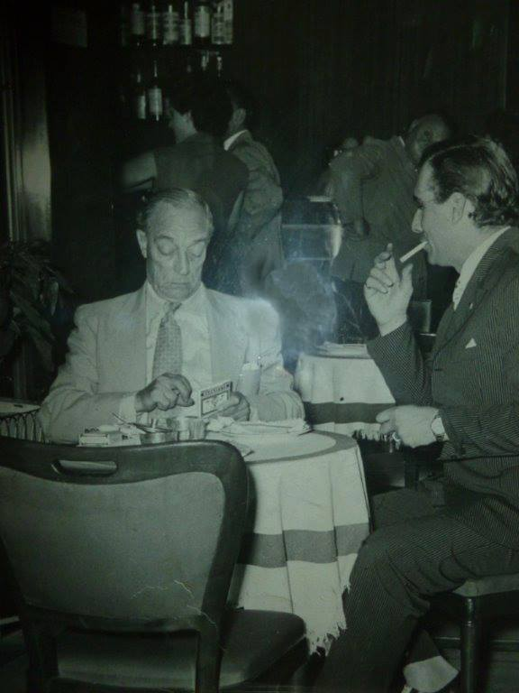 Elio Schiavoni con Buster Keaton nel 1954 in occasione dello spettacolo "Il piccolo naviglio". Produzione Bataclan